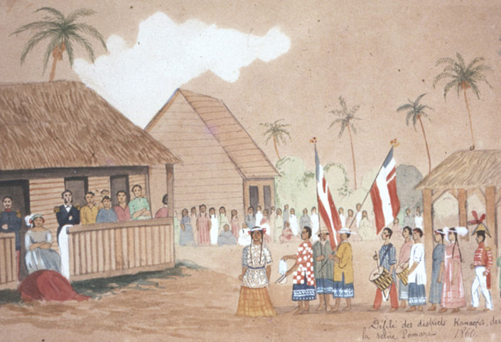 Défilé des districts devant la reine Pomare, souveraine de « l’état protégé » : à ses cotés le représentant de « l’état protecteur ».